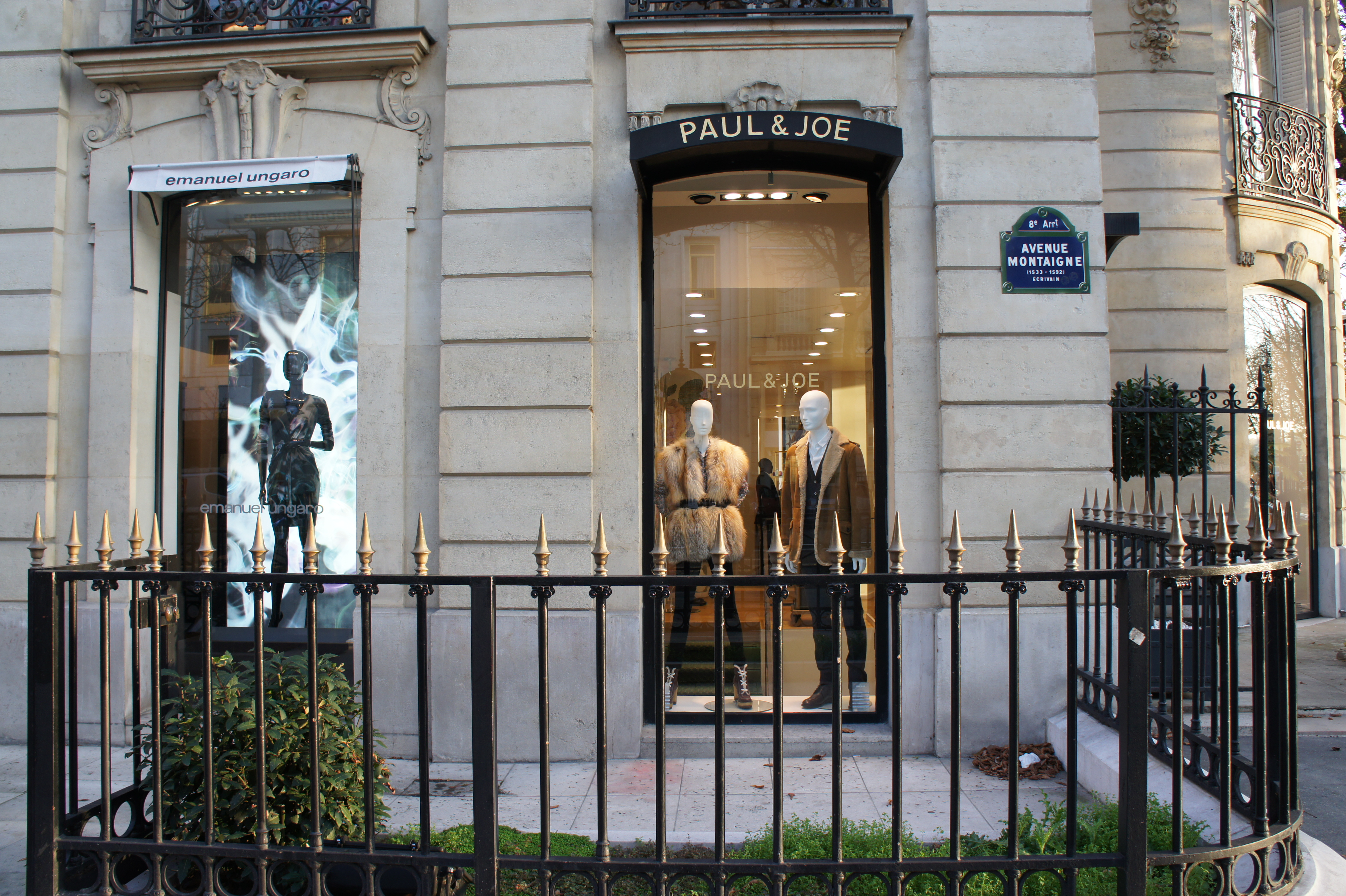 angle avenue Montaigne